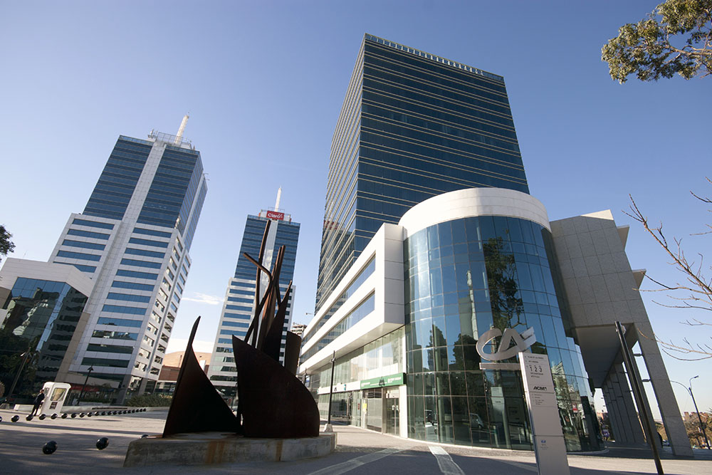 World Trade Center Montevideo